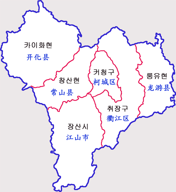 저장성 취저우시 현급행정구역도